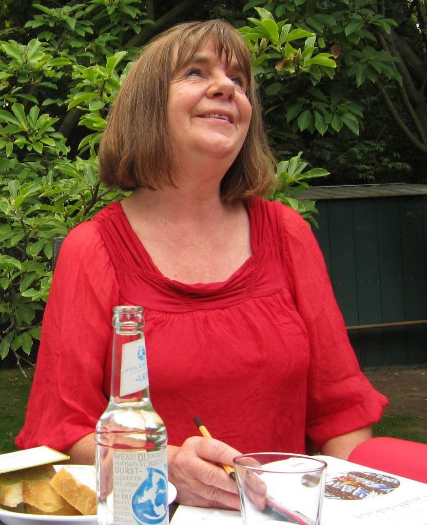 Axel Scheffler und Julia Donaldson im Rahmen des Kinder- und Jugendprogramms des 11. internationalen literaturfestivals berlin am 17.09.2011 im Garten des Hauses der Berliner Festspiele in Berlin